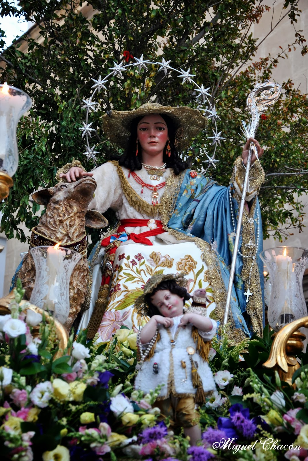 Salida Procesional 2013